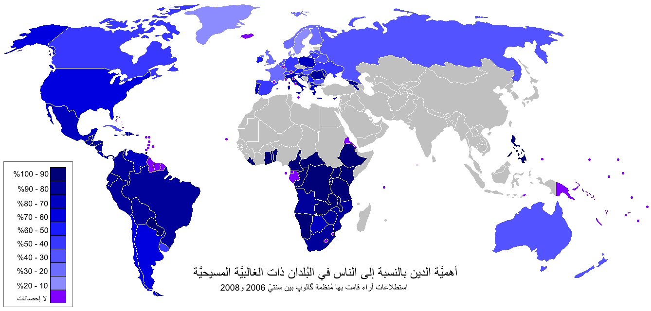 أهميَّة الدين بالنسبة للناس في البُلدان ذات الغالبيَّة المسيحيَّة، أو التي يُمثِّلُ النصارى فيها جُزءًا بارزًا من المُجتمع. وُضعت هذه البيانات بالاستناد إلى دراسة أنجزتها مُنظمة گالوپ بين سنتيّ 2006 و2008م.